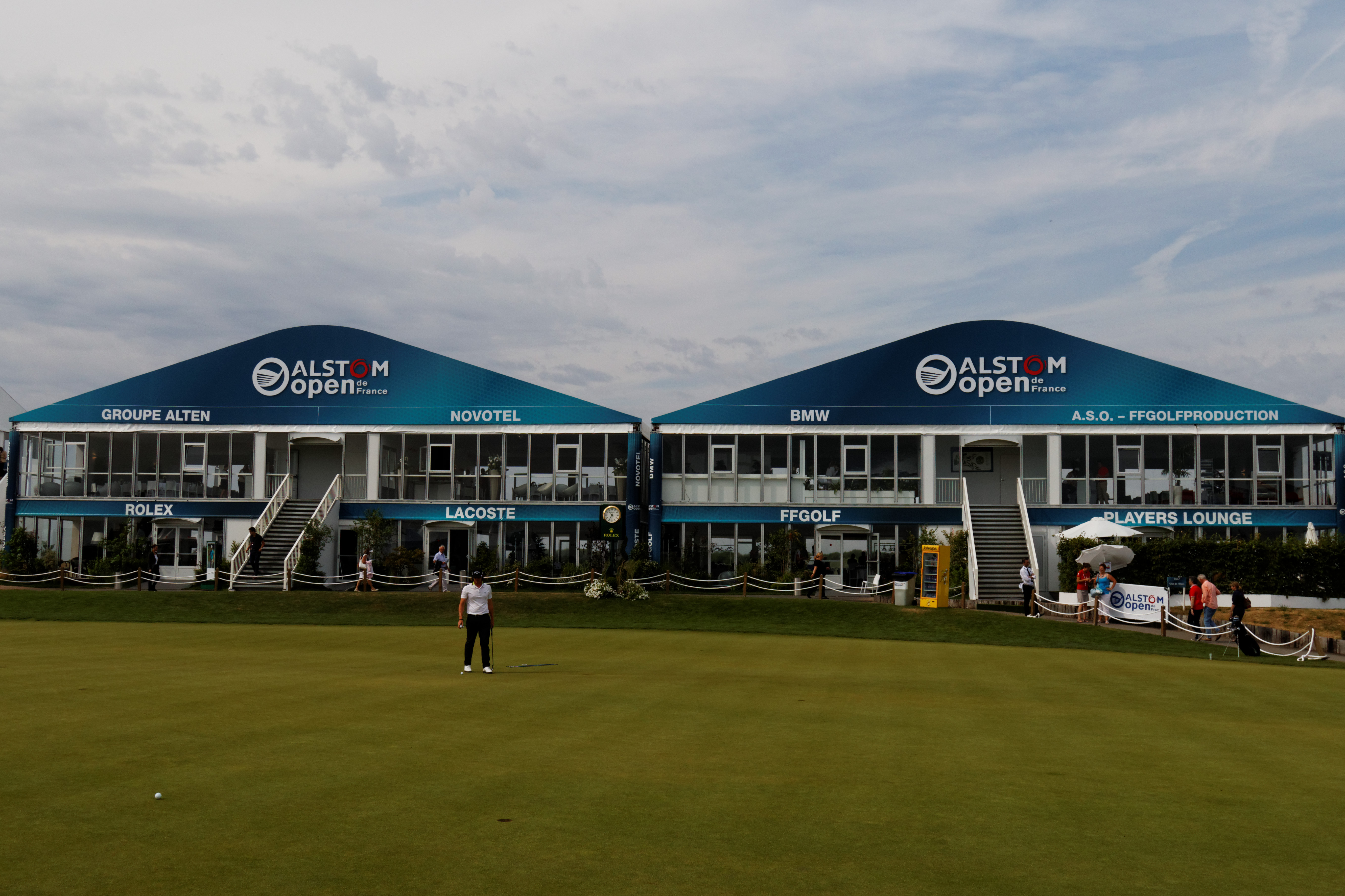 Photo prise lors de l'Alstom - Open de France 2015 - putting green face au Player's Loundge